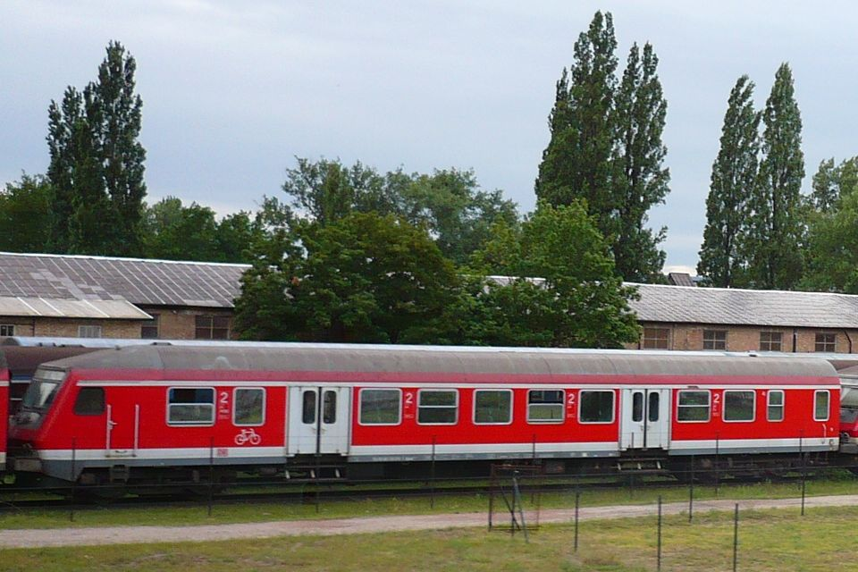 Régi német vezérlőkocsi Dunakeszin